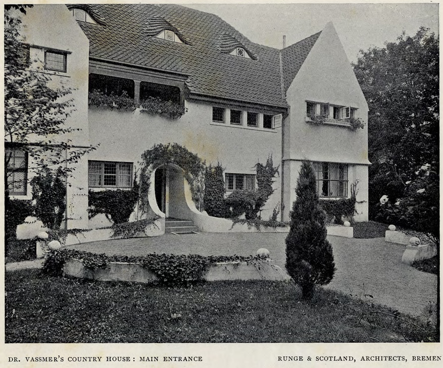 Landhaus Johs. Vassmer, Bremen, Horner Heerstraße 19, 1907 von Runge & Scotland